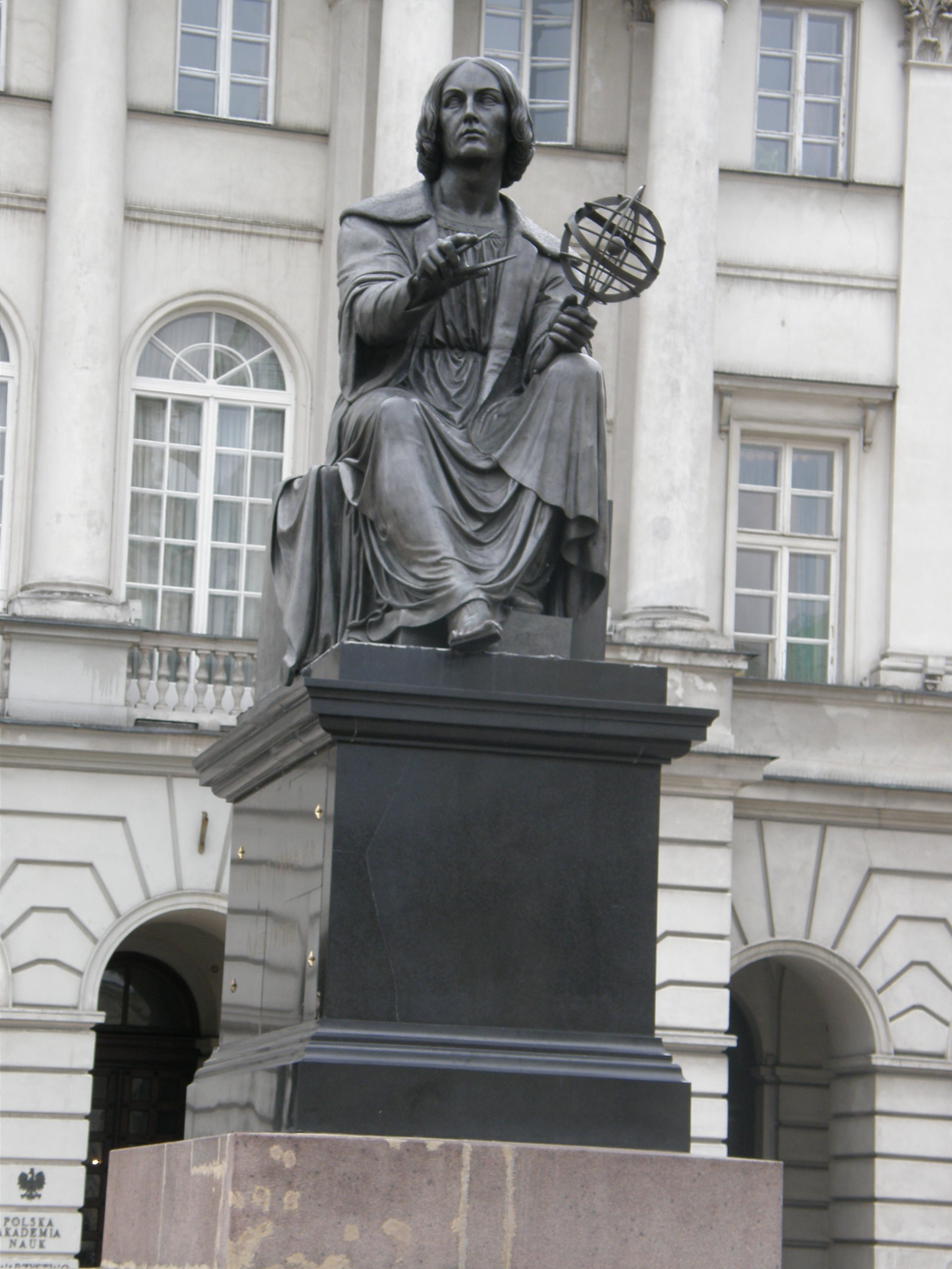 Το άγαλμα του Κοπέρνικου μπροστά από την Ακαδημία Επιστημών της Πολωνίας